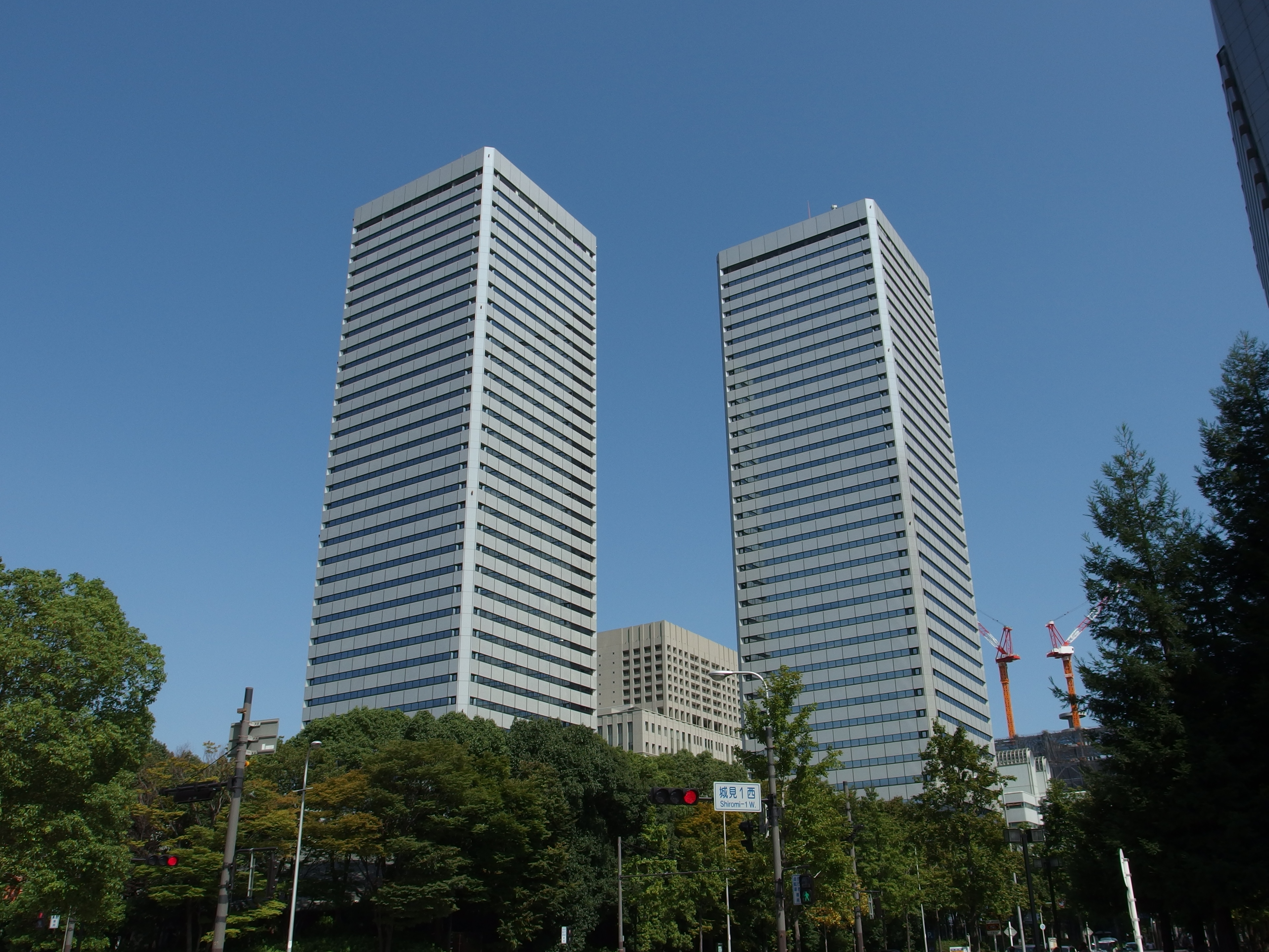 TWIN21, 大阪府大阪市